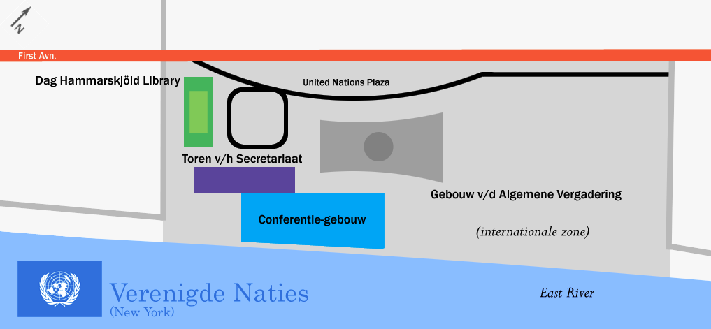 Zelfgemaakt op basis van een luchtshot. Hierbij deponeer ik deze plattegrond in het publiek domein.